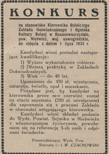 Tygodnik rolniczy, nr 21-22, Wilno, 01.06.1933 r.